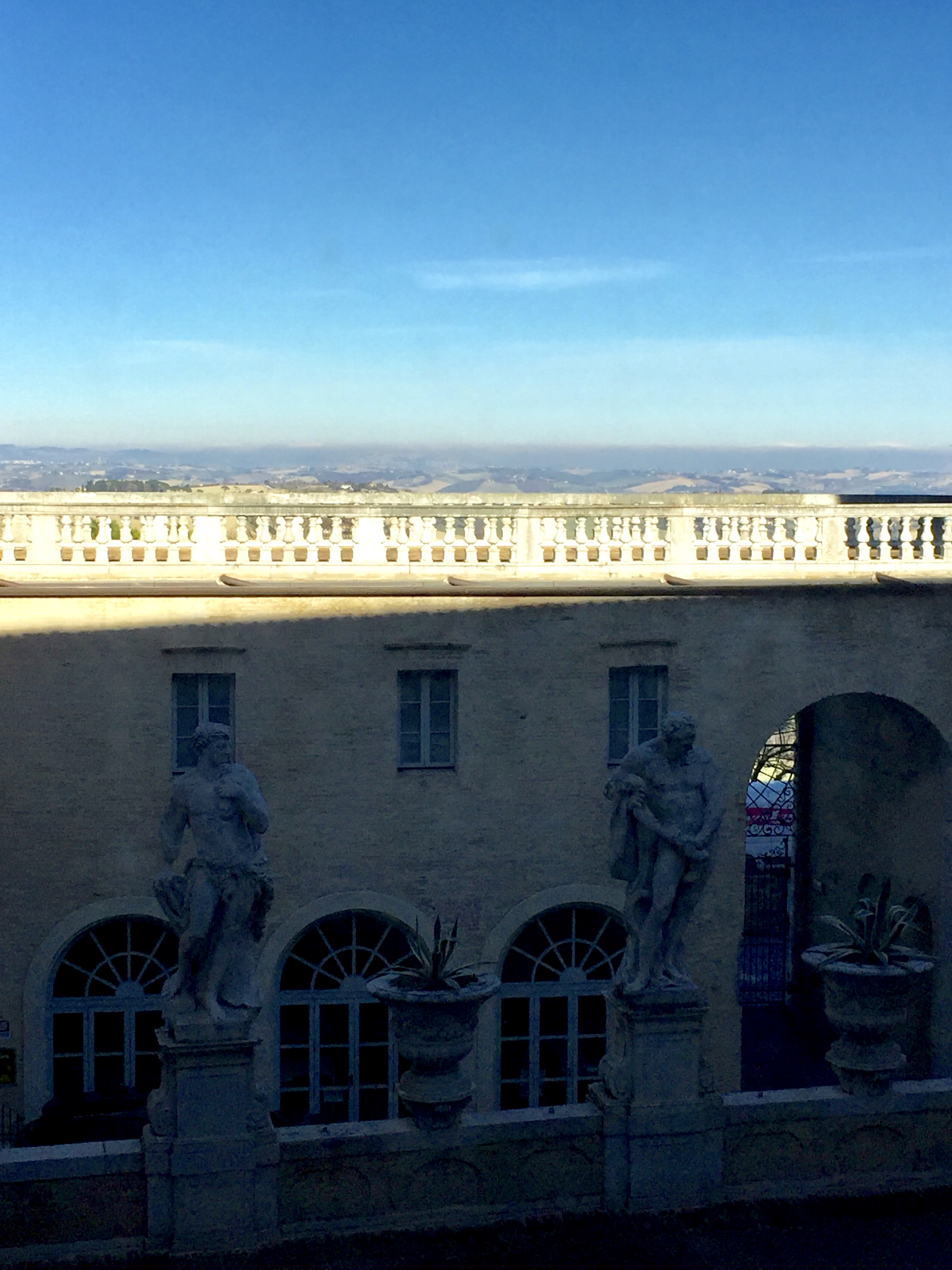 Les environs de Macerata depuis Palazzo Buonaccorsi